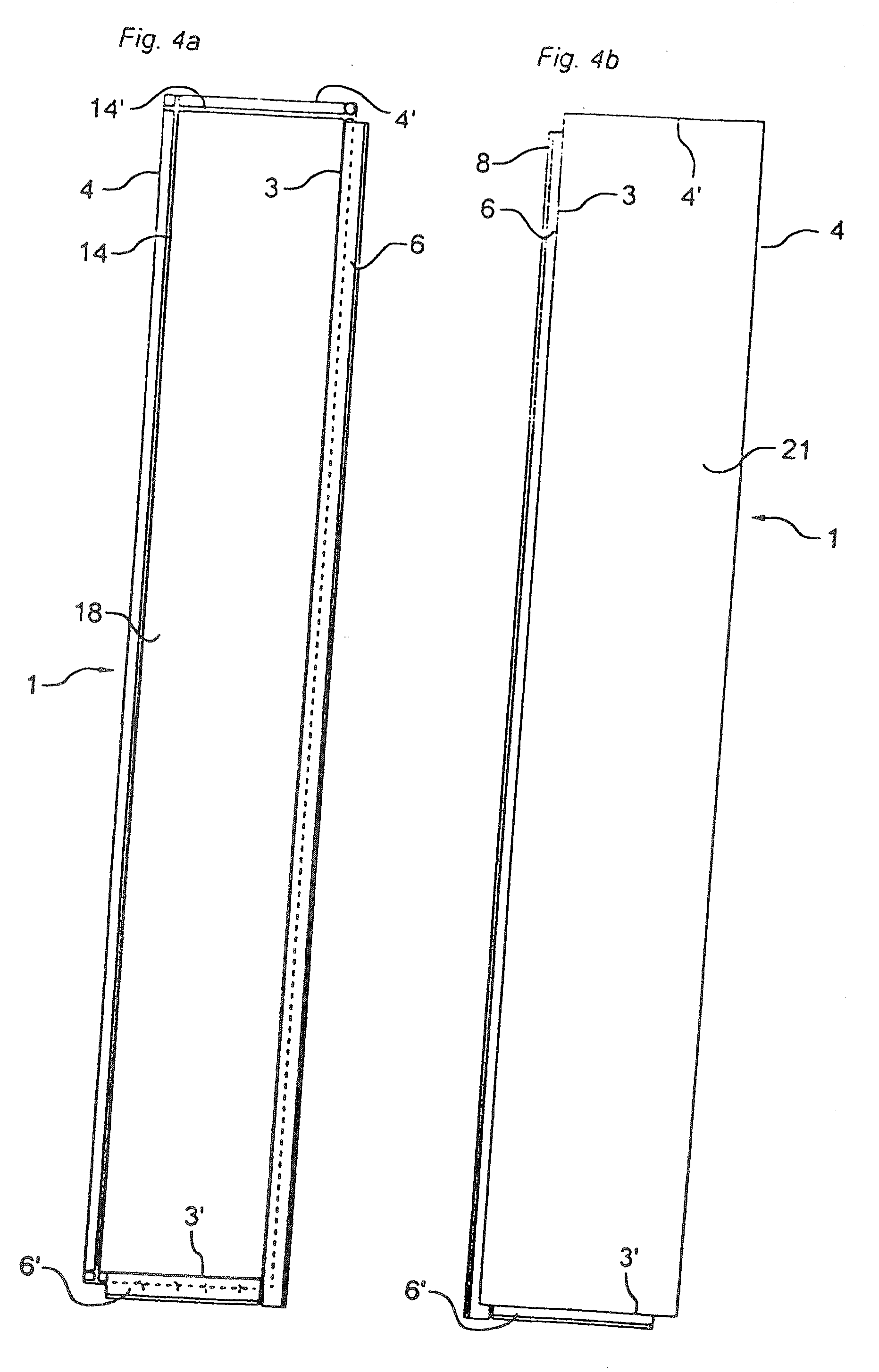 En golvskiva sedd underifrån (fig 4a) respektive uppifrån (fig 4b).